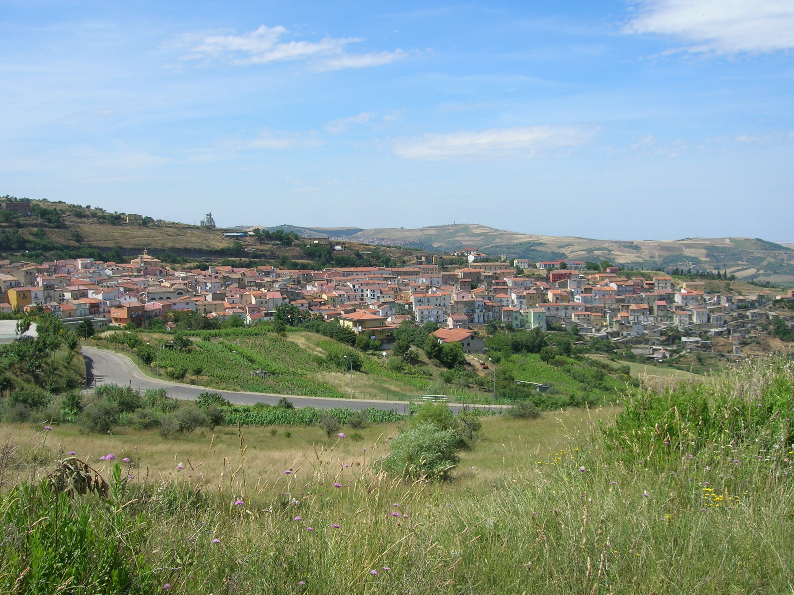 Panoramica di Barile (PZ)